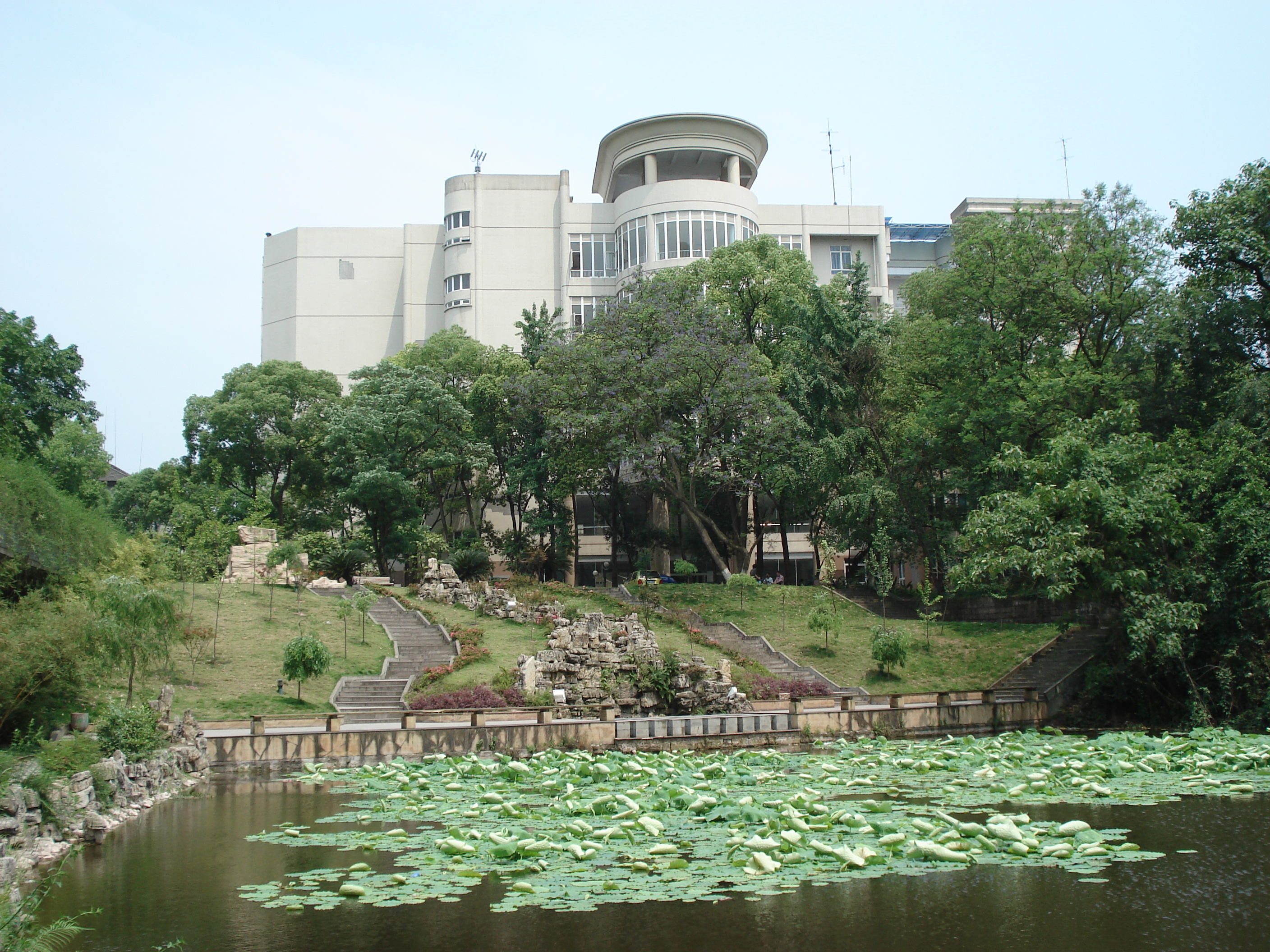 西南大學第八教學樓